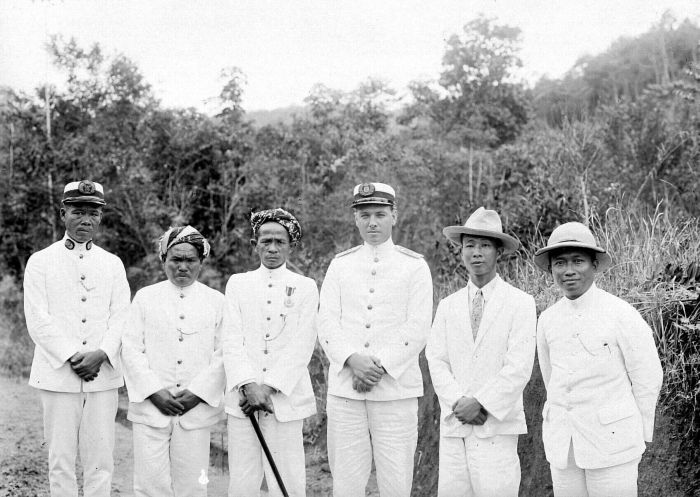 Negatief. Bestuursambtenaar met hoofden van Djambi